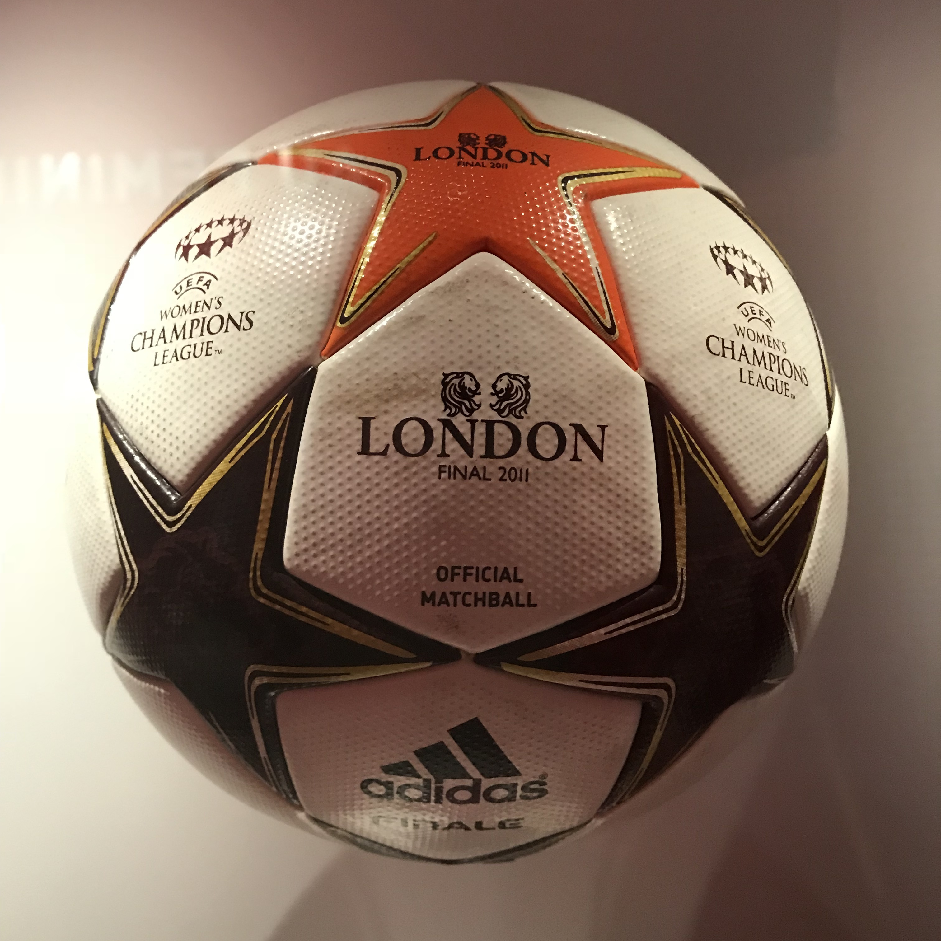 OL Le Musée au Parc OL.